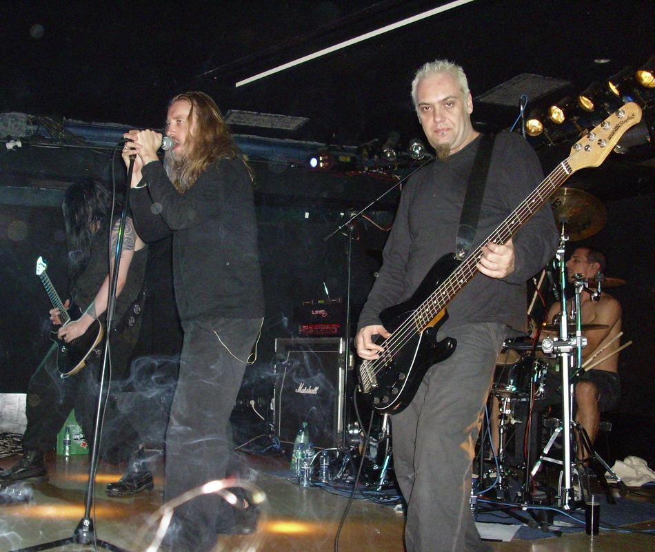 Paradise Lost actuando en Madrid el 17 de septiembre de 2007.